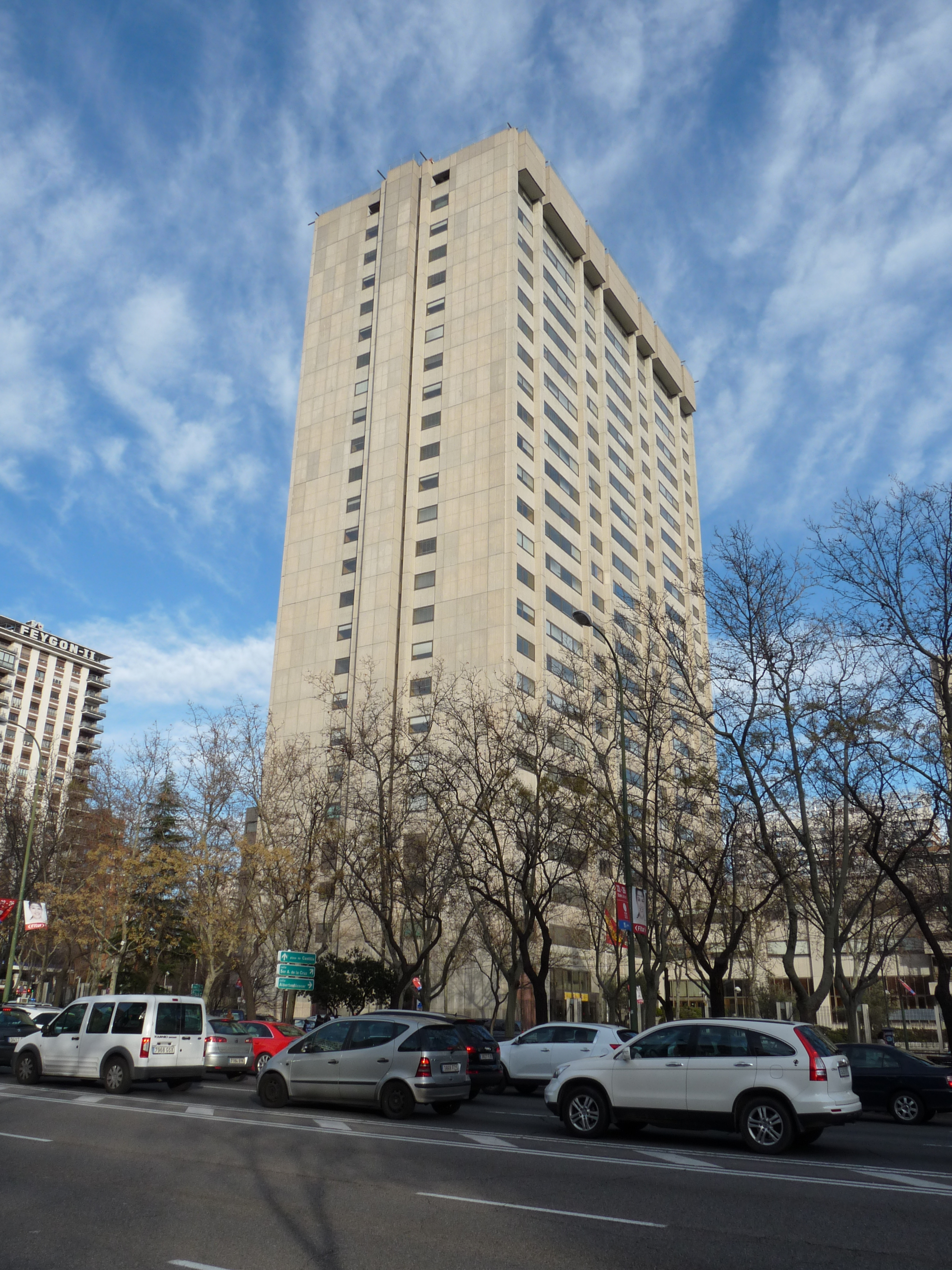 Edificio en la esquina de la calle Alberto Alcocer con el paseo de la Castellana, Madrid.